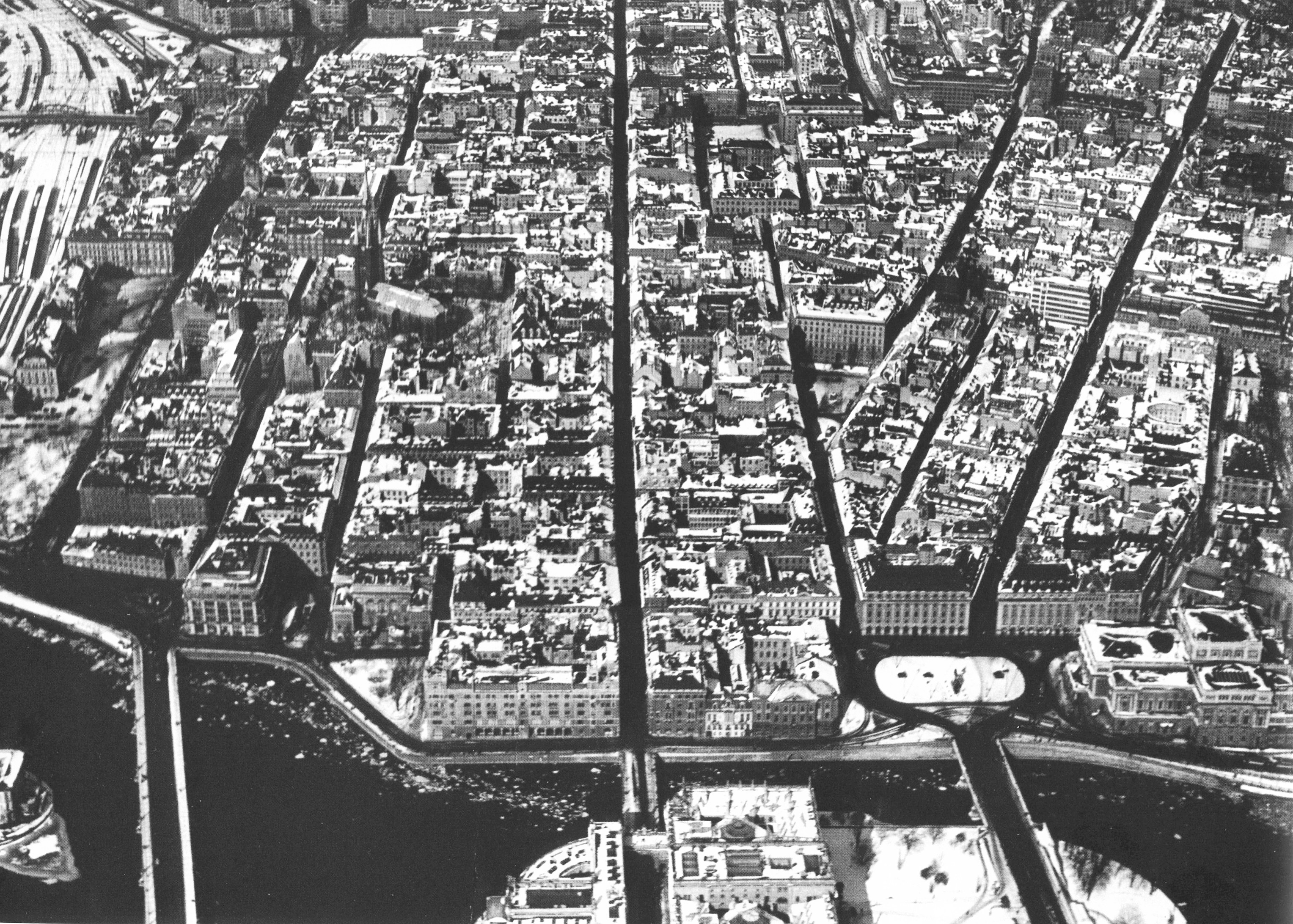 Nedre Norrmalm med vy mot norr på 1930-talet